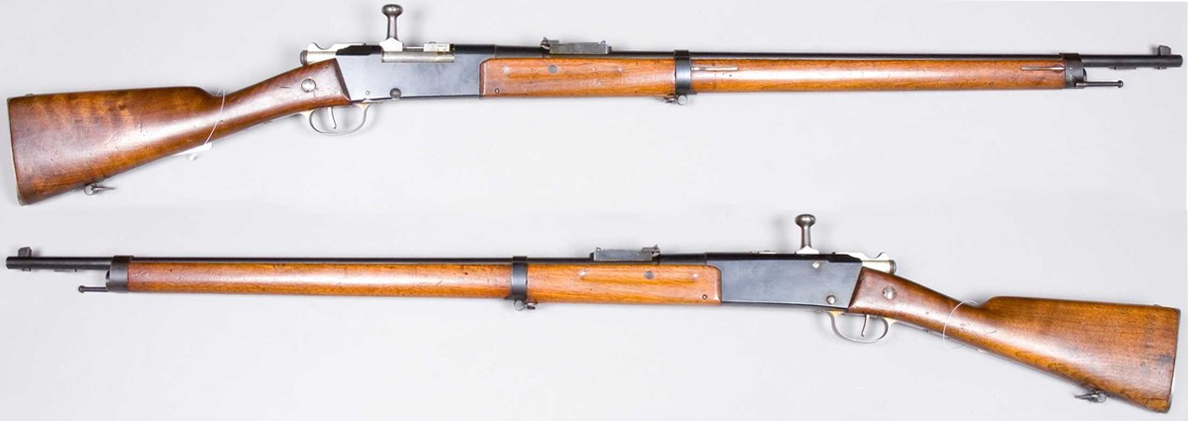 Francoska repetirka Lebel M1886.